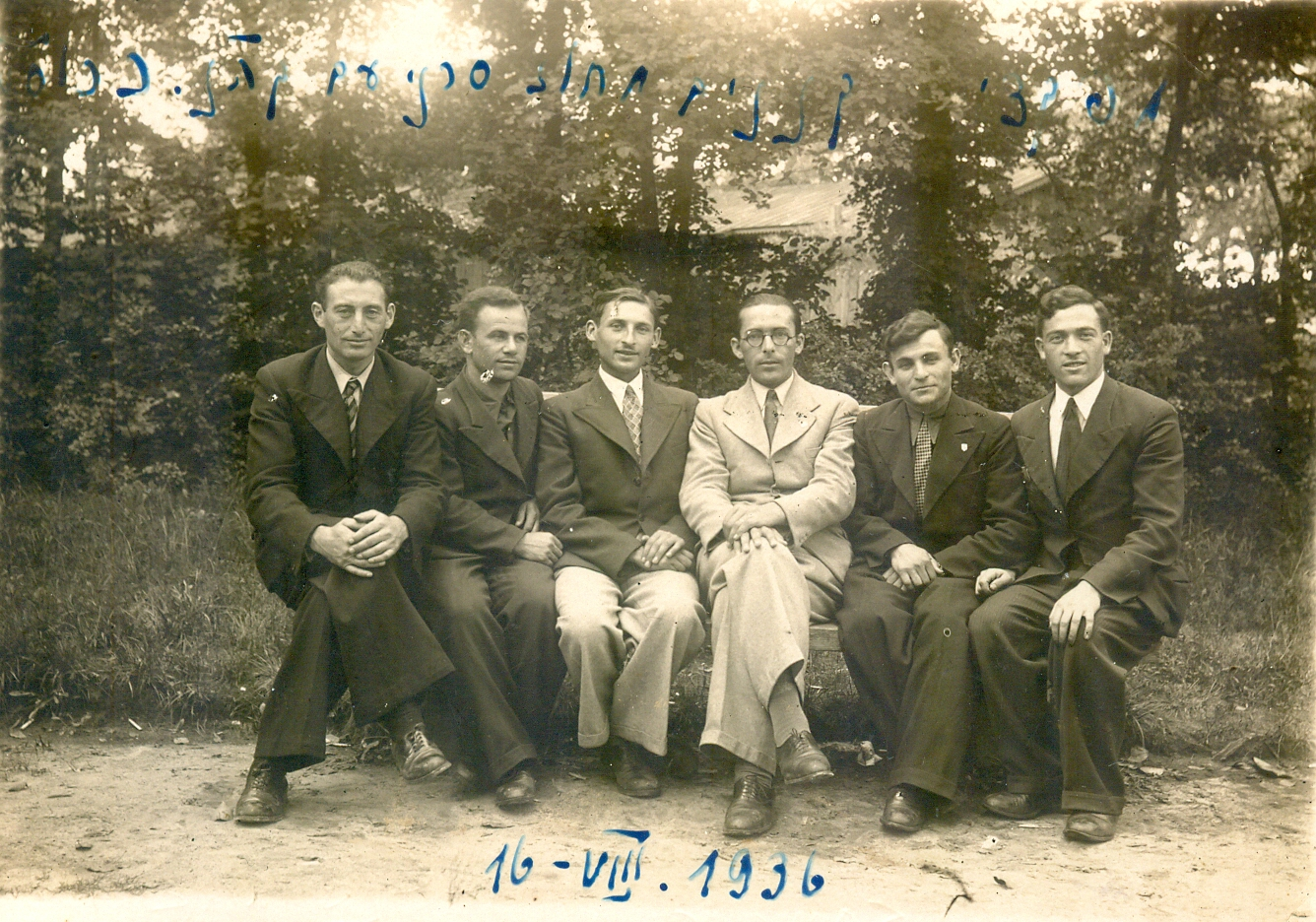 אהרון שביט (שטרן) עם קצין שלטון בית"ר יוסף כרוסט ומפקדי המחוז - כנס בית"ר ב-סרנה